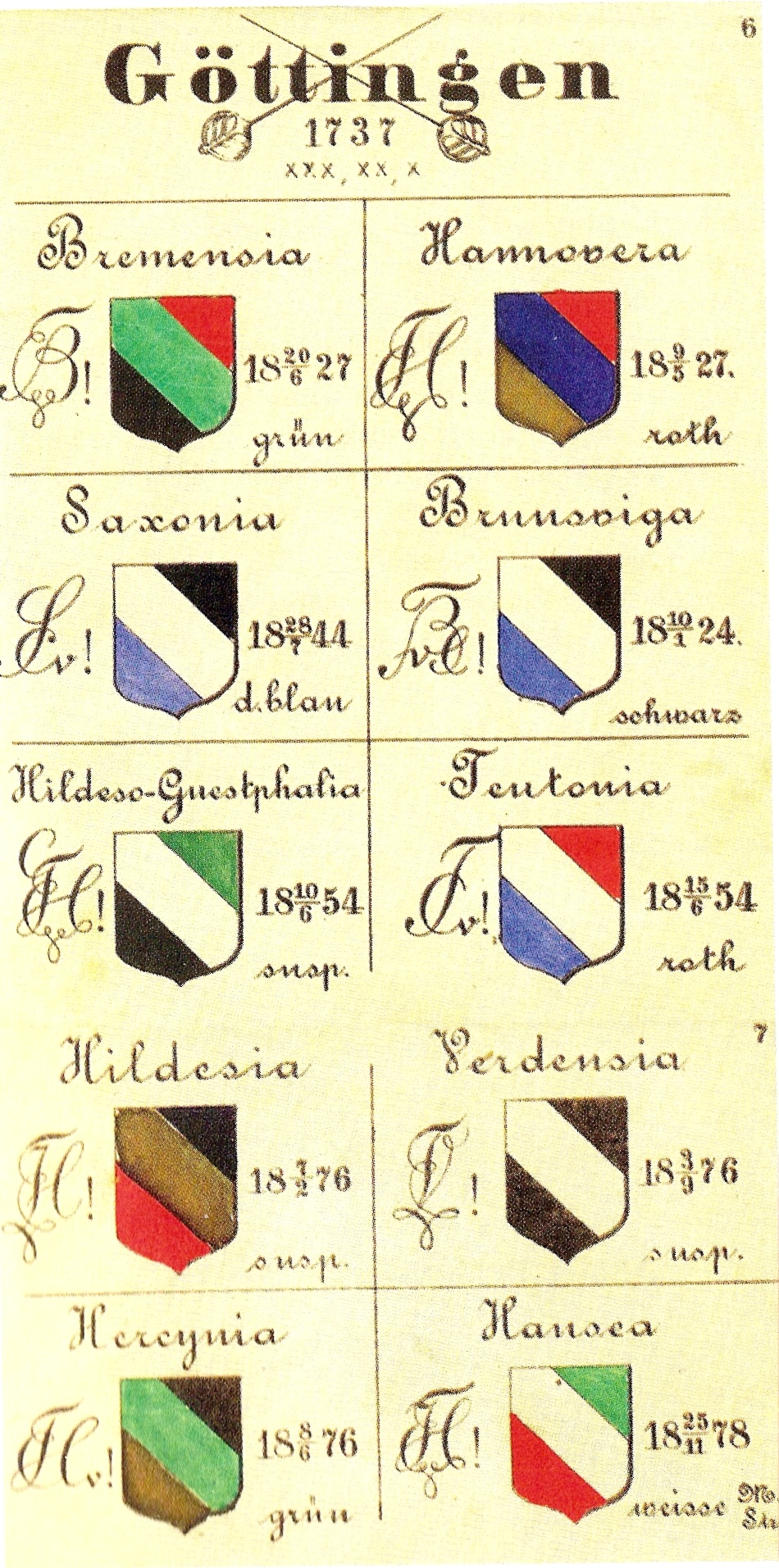 Farbentafel der Kösener Corps im Göttinger Senioren-Convent 1881, ursprünglich 1881 erschienen als Teil des "Vademecum für den deutschen Corpsstudenten." Jena bei Carl Hahn & Sohn 1881. Das Jahr 1737 ist das Jahr der Inauguration der Göttinger Universität.